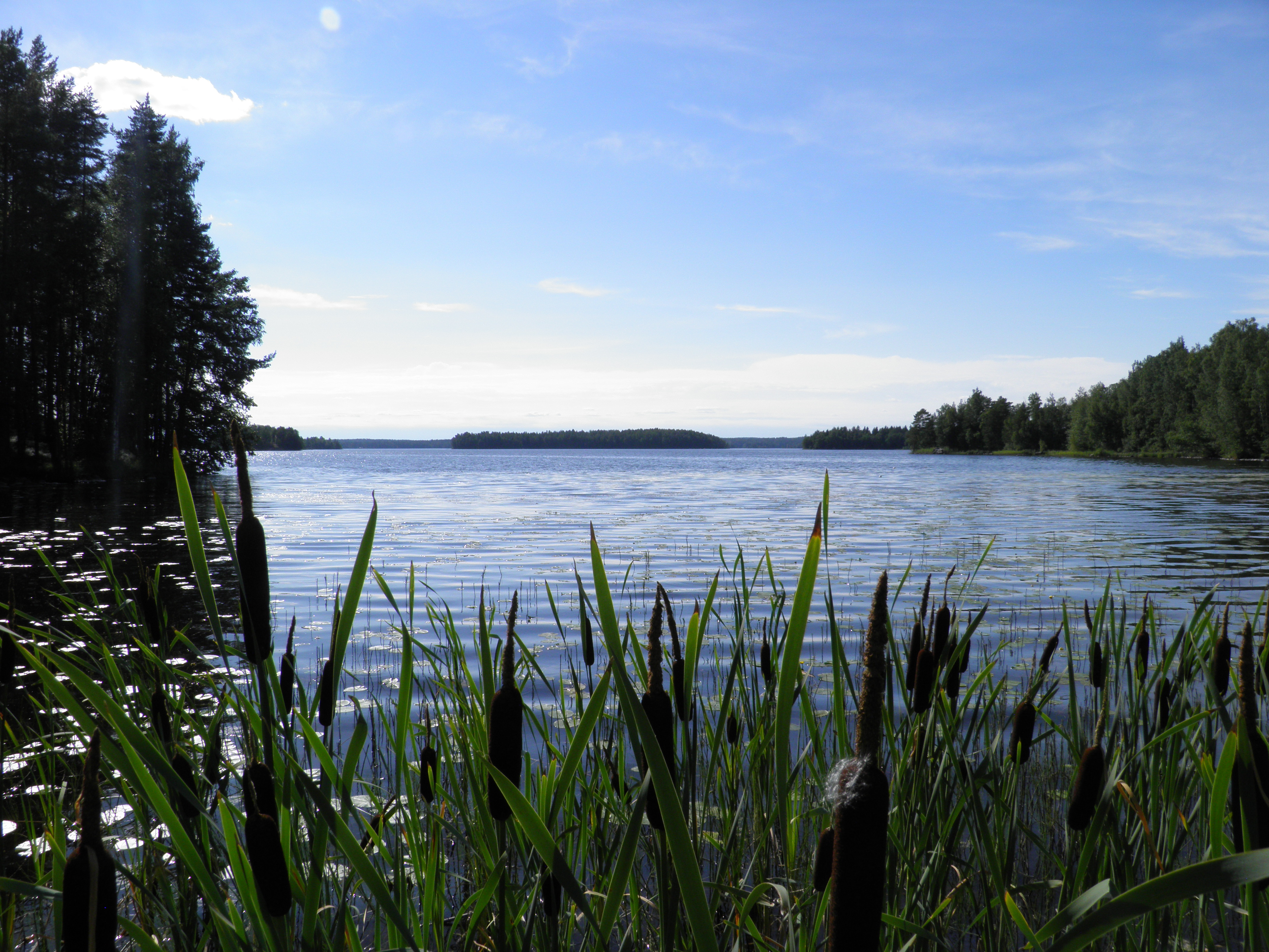 Kuohijärveä Hämeenlinnan Lammilla idästä Saarostenlahdelta nähtynä.